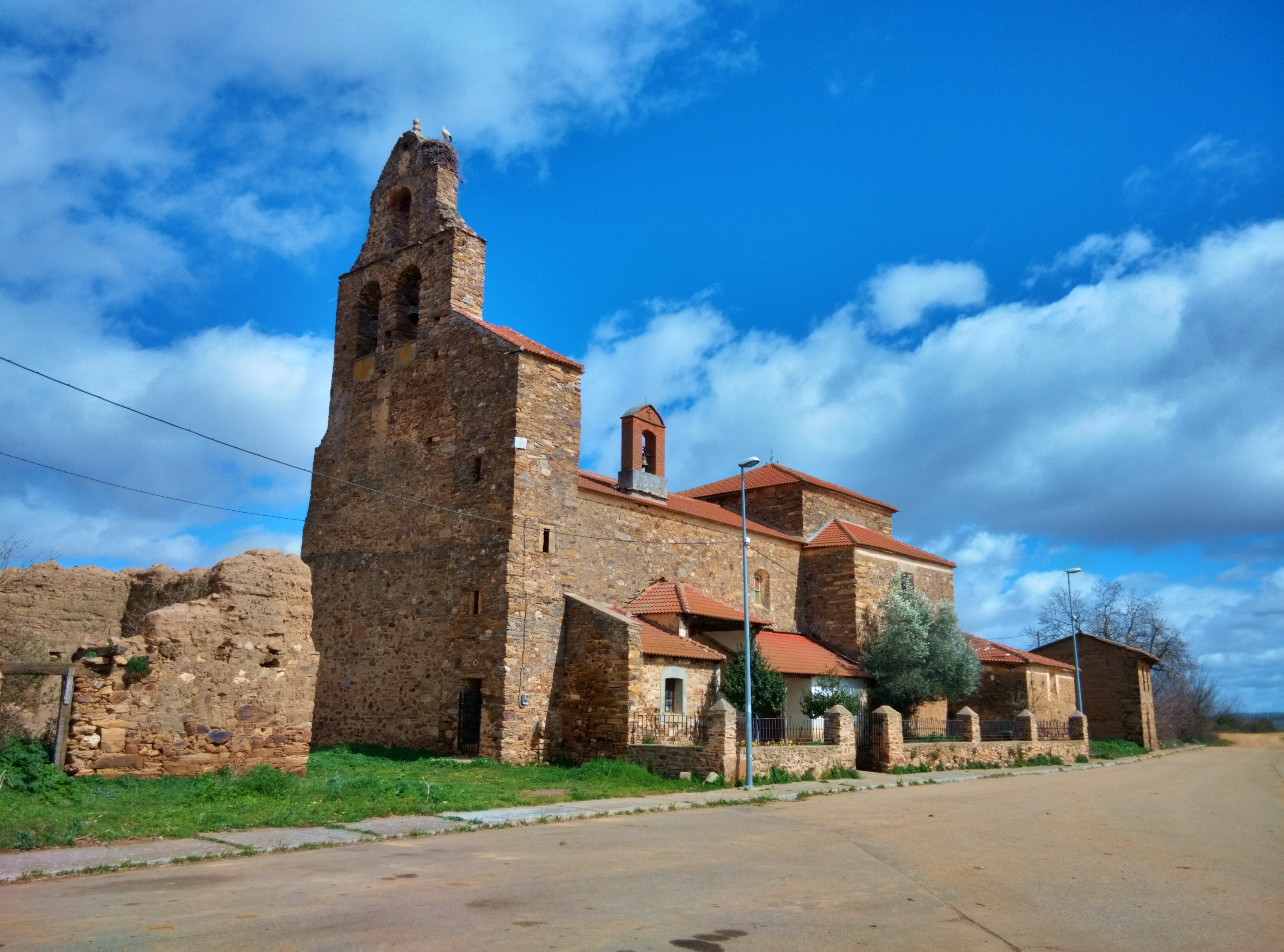 Iglesia de San Pedro Apóstol en Quintana del Marco (León, España).